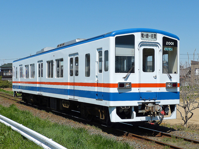 関東鉄道キハ2000形車両。入地～竜ヶ崎にて。 Panasonic Lumix DMC-FZ150